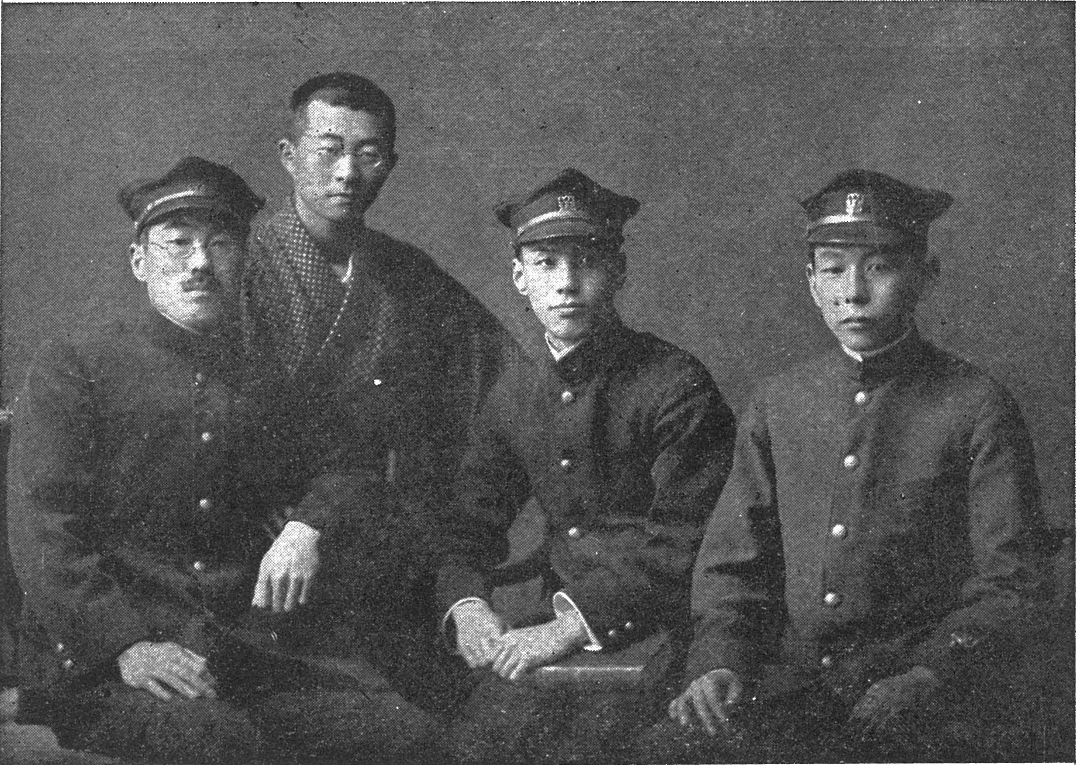 大正5年頃の久米正雄、松岡譲、芥川龍之介、成瀬正一。堀辰雄・葛巻義敏・芥川比呂志 編集『芥川龍之介作品集第1巻』より。